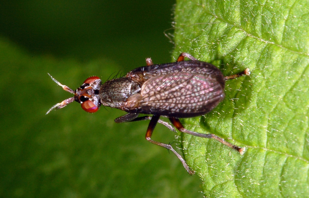 Sciomyzidae Coremacera marginata, Idstein, Hessen, Deutschland